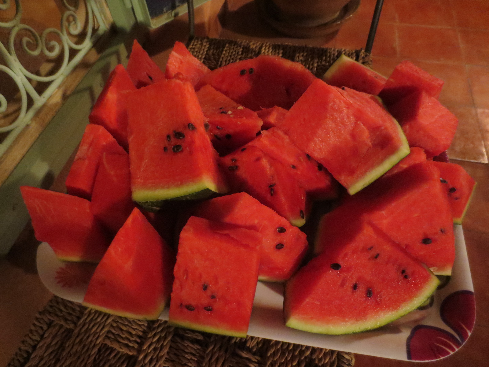 Pastèque marocaine